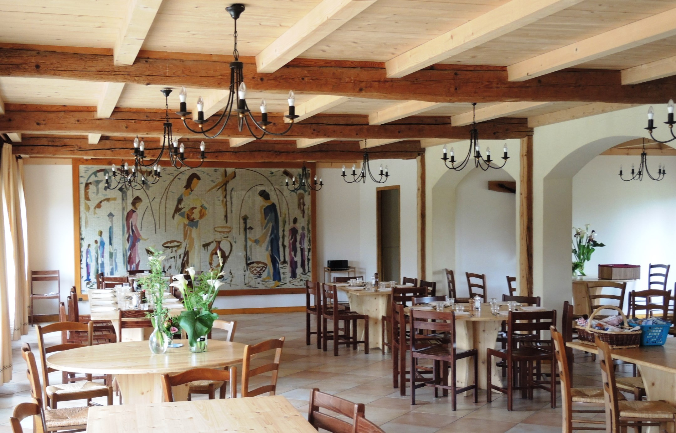 Champagne (Ardèche) détail